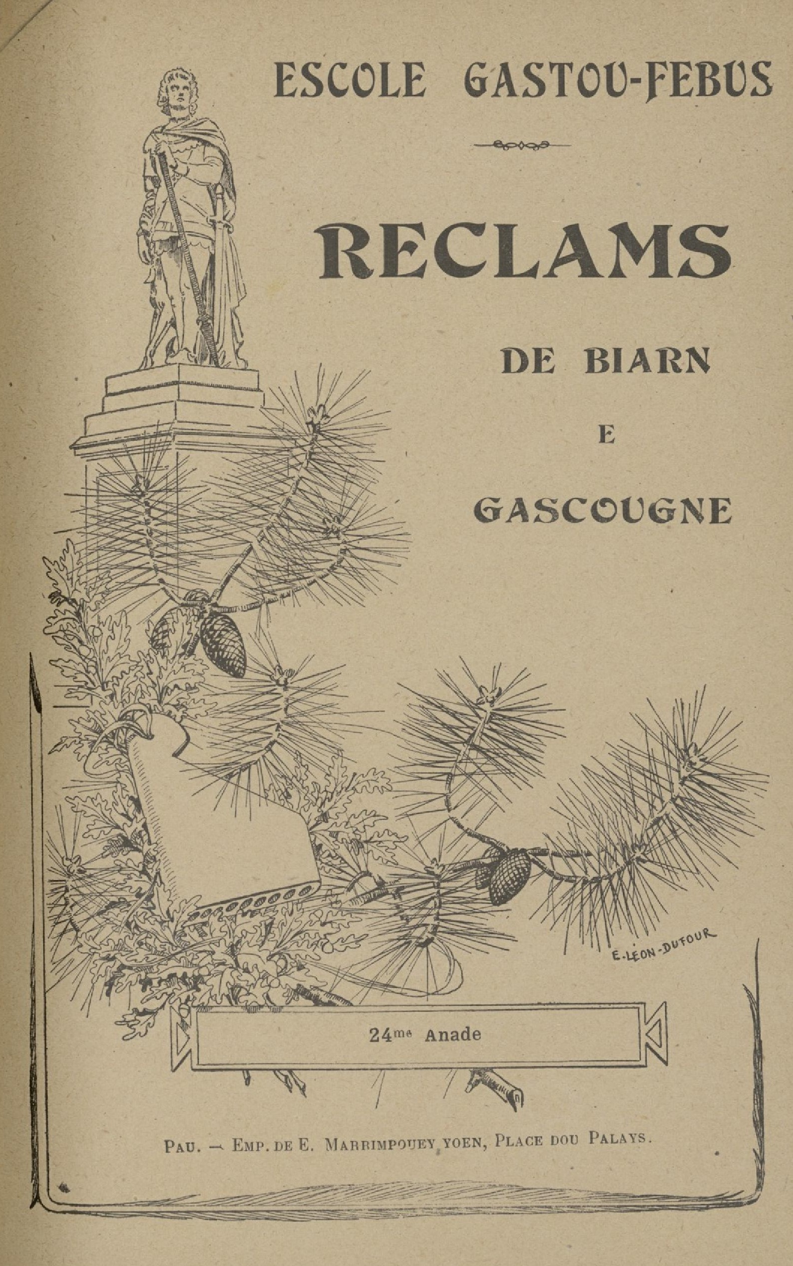 Reclams de Biarn et Gascougne, Escole Gastou-Febus. 1920